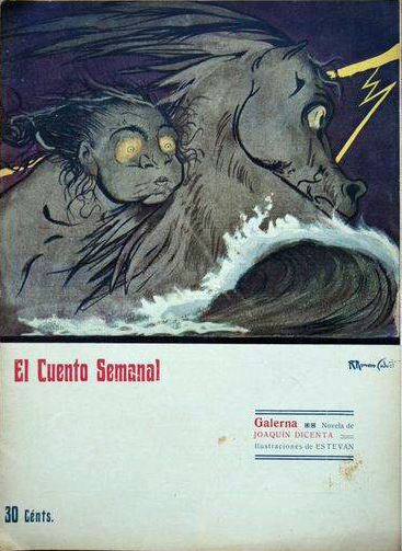 Portada de Galerna.